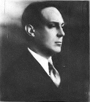 José Aguirre Cámara, político conservador argentino, en Campo de Mayo, 1930.